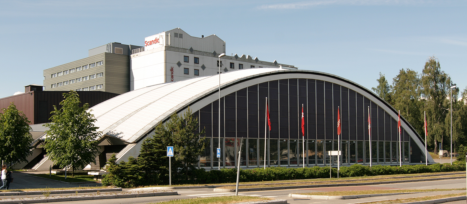 Hamarhallen. Bygd 1961. Arkitekt: Frode Rinnan